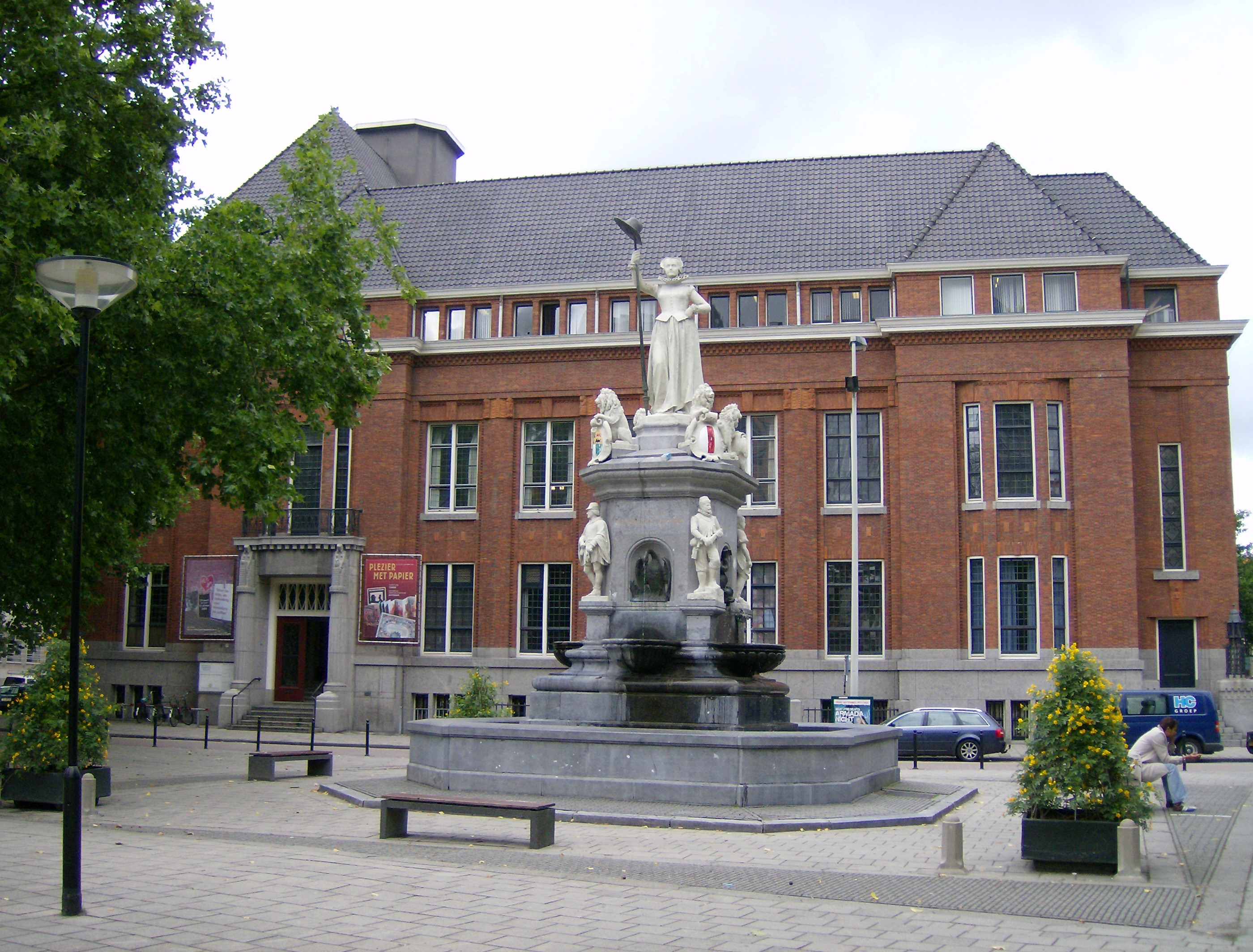 Het voormalige pand van de Gemeentelijke Bibliotheek, met voor het monument De Maagd van Holland, dit monument moet voorstellen de bevrijding van de Franse bezetting in de 19e Eeuw. DHet pand van de voormalige Gemeentelijke bibliotheek kwam o.a. het Onderwijsmuseum erin. Ook dit museum is sinds 2012 uit dit pand vertrokken, dit vanwege dat het Erasmus Universiteit dit laat ombouwen dit schoolgebouw. Het museum komt in de toekomst in Dordrecht.